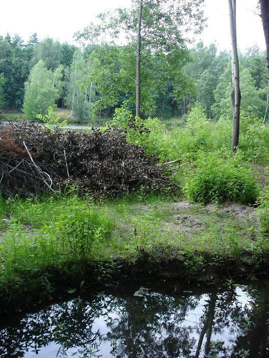 Přírodní památka Bělečský písník (ev. č. 822) se nachází asi 5 km východně od krajského města Hradec Králové tůň a v pozadí vlastní písník